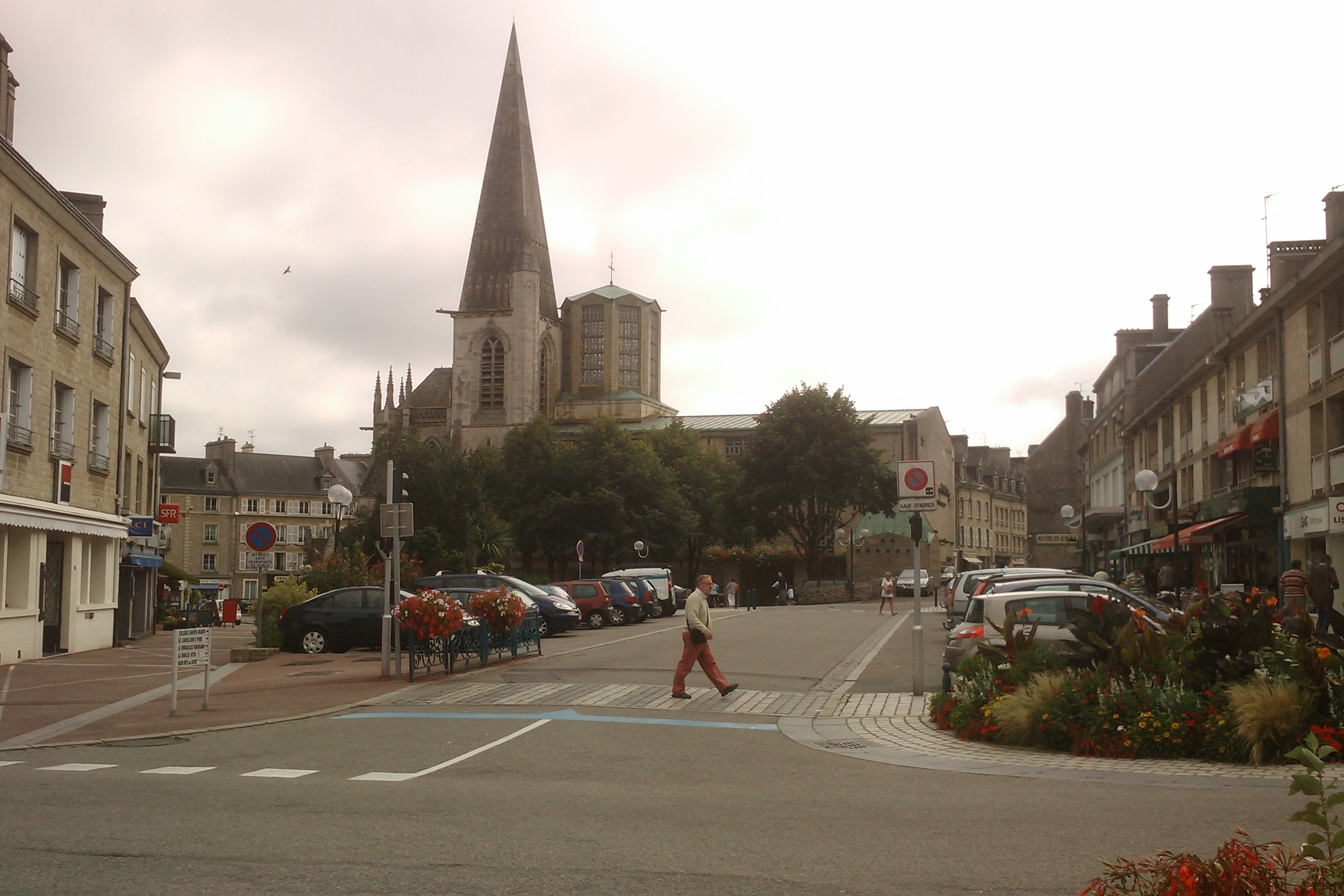 Place Vicq d'Azir à Valognes avec au fond l'église Saint Malo